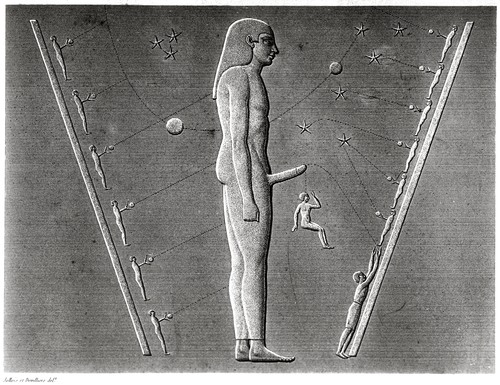 Représentation d'une clepsydre sur les murs de la tombe de Ramsès VI, dans la vallée des rois